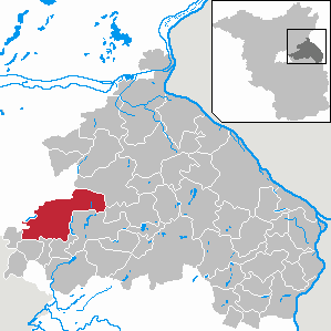 Altlandsberg in Brandenburg (Country) - District Märkisch-Oderland